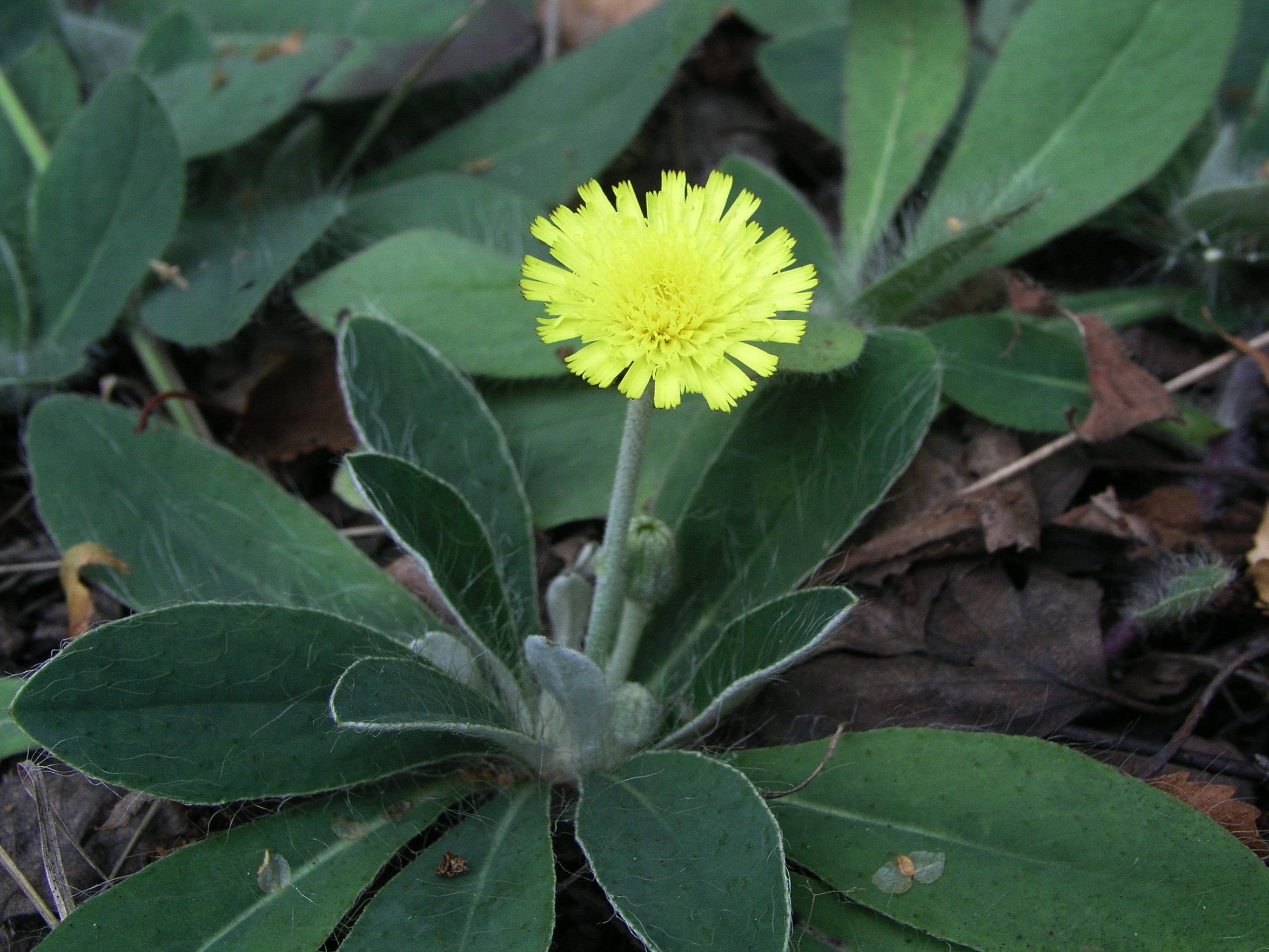 Ястребинка волосистая (Hieracium pilosella). Снимок сделан в середине июля во Владимирской области в сосновом лесу. Листья опушены длинными волосками; английское название переводится как Мышиное ушко (Mouse-ear); содержит густой белый млечный сок.